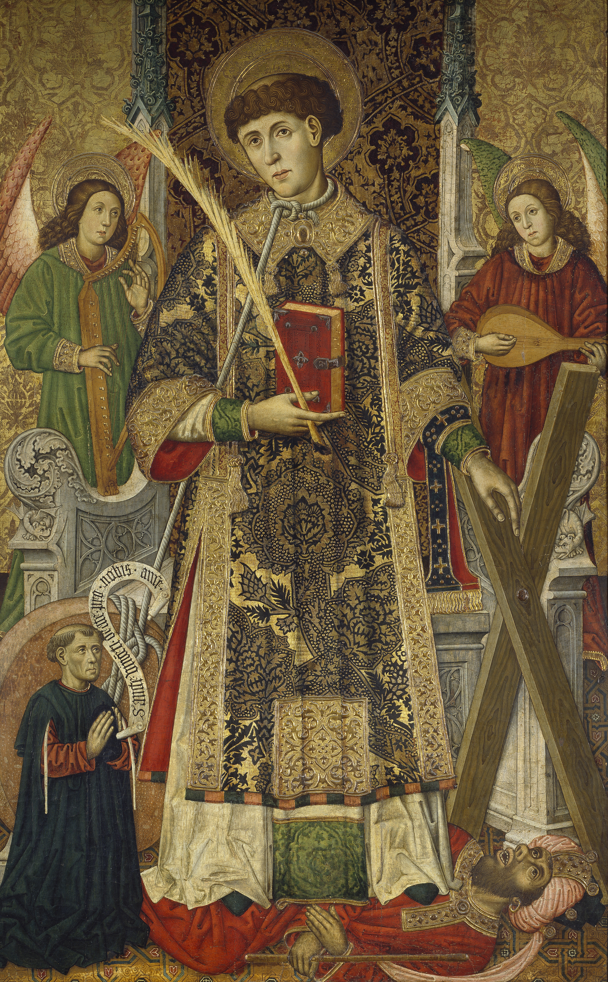 La obra representa al diácono y mártir San Vicente de Huesca, que murió en tiempos del Imperio Romano por profesar el cristianismo.